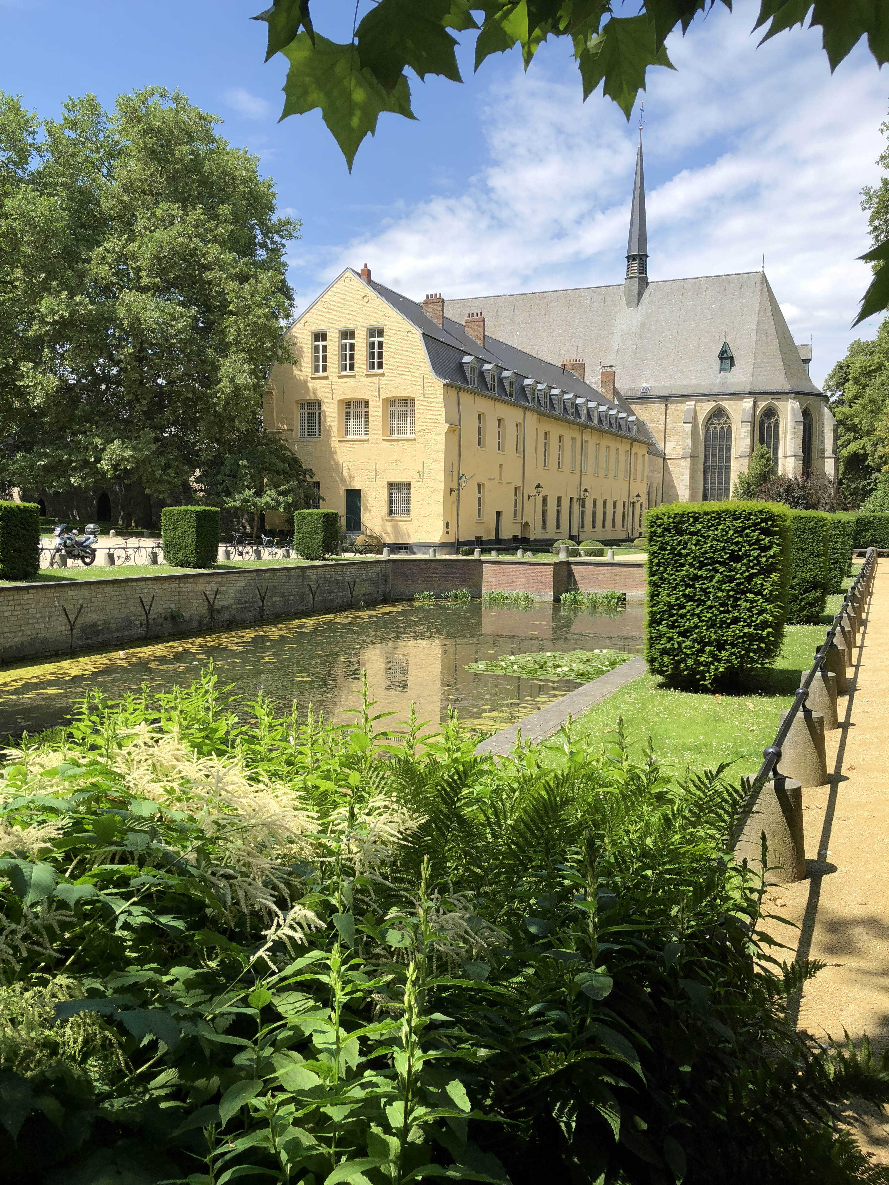 The fishpond of la Cambre Abbey